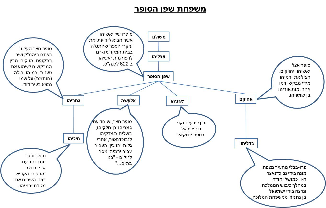 שושלת שפן הסופר - המאות ה-6-7 לפנה"ס